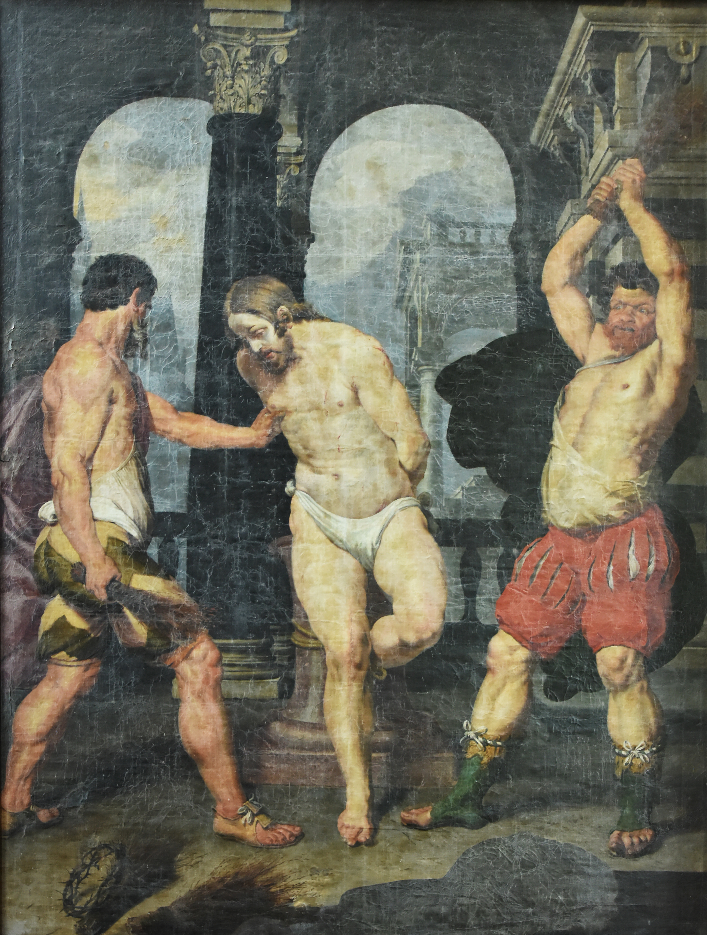 Jan Janssens (1590-circa1650) De geseling van Christus Sint-Michielskerk Gent 30-06-2019 This photo of movable heritage has been taken in the Flemish Region